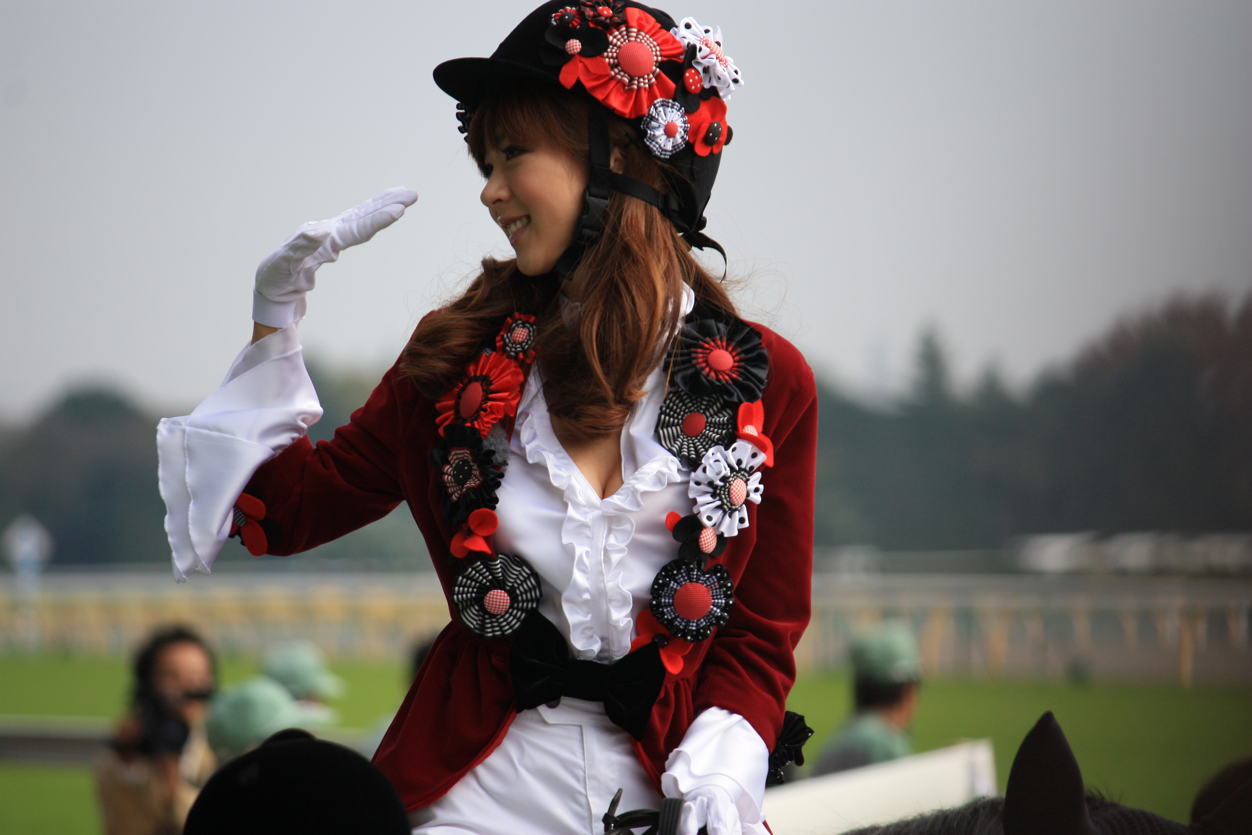 競馬場でのほしのあき